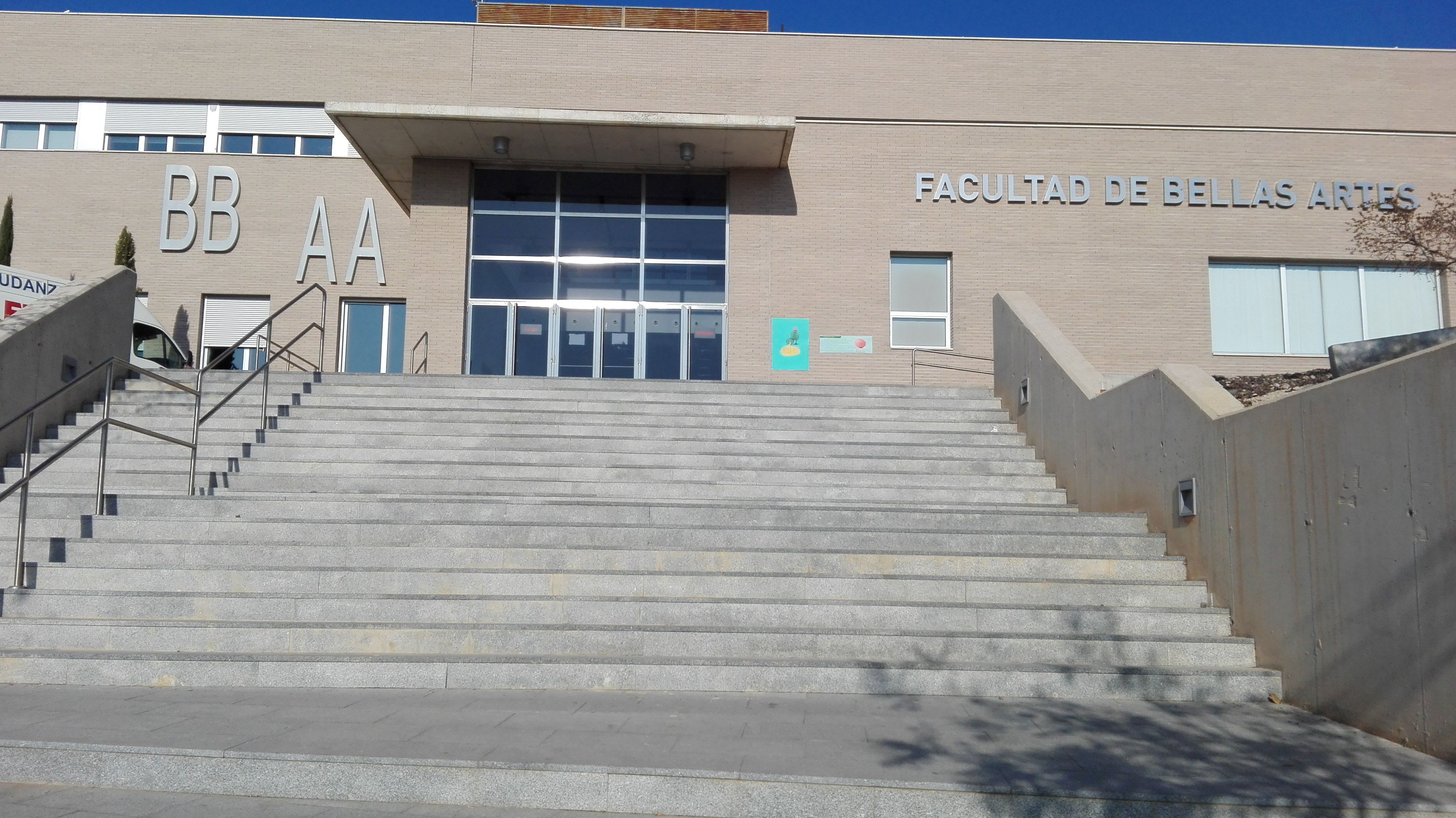 Facultad de Bellas Artes